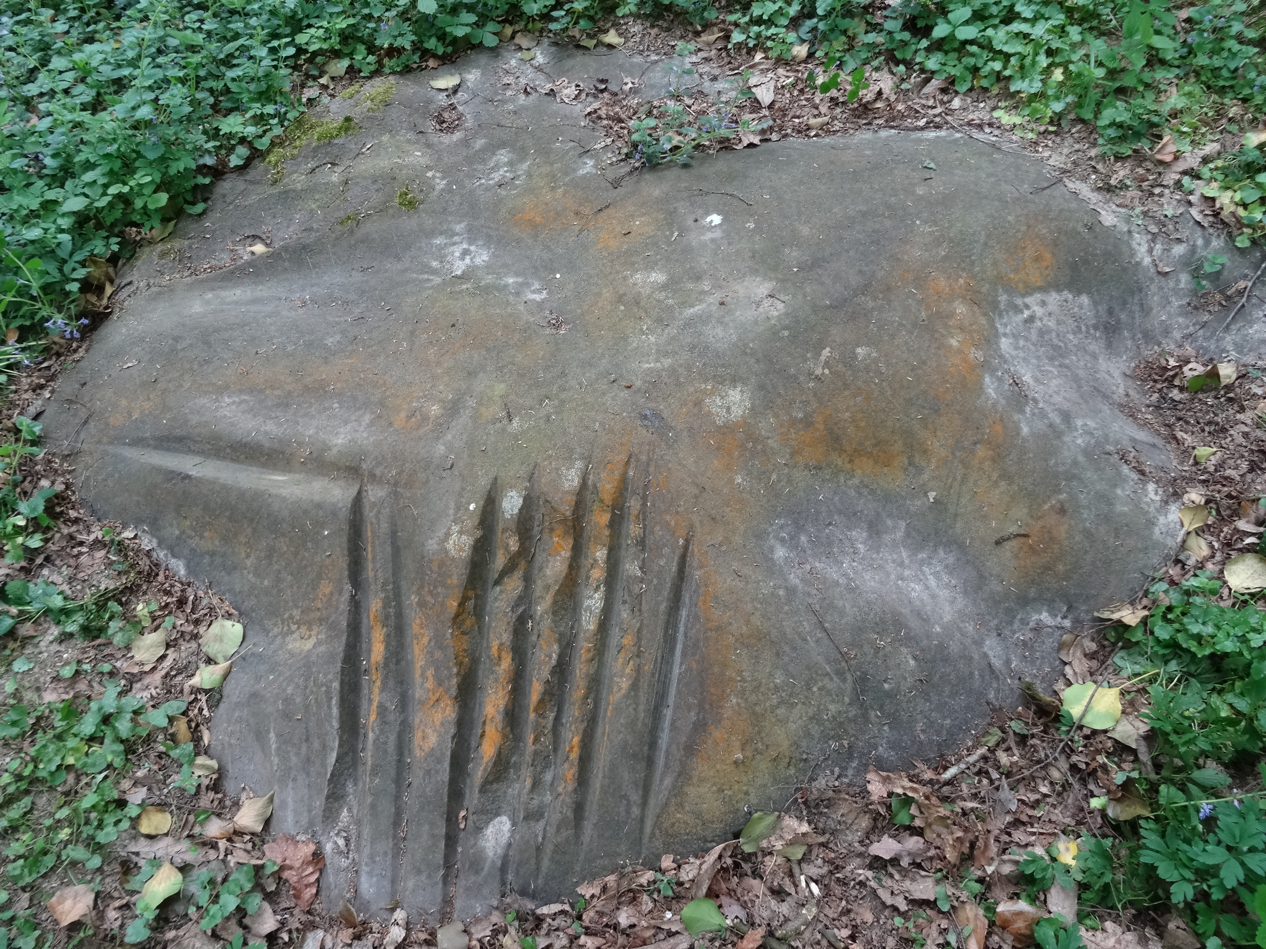 Polissoir du bois de la Charmille. (commune de Villeconin en limite de Souzy-la-Briche, Essonne).